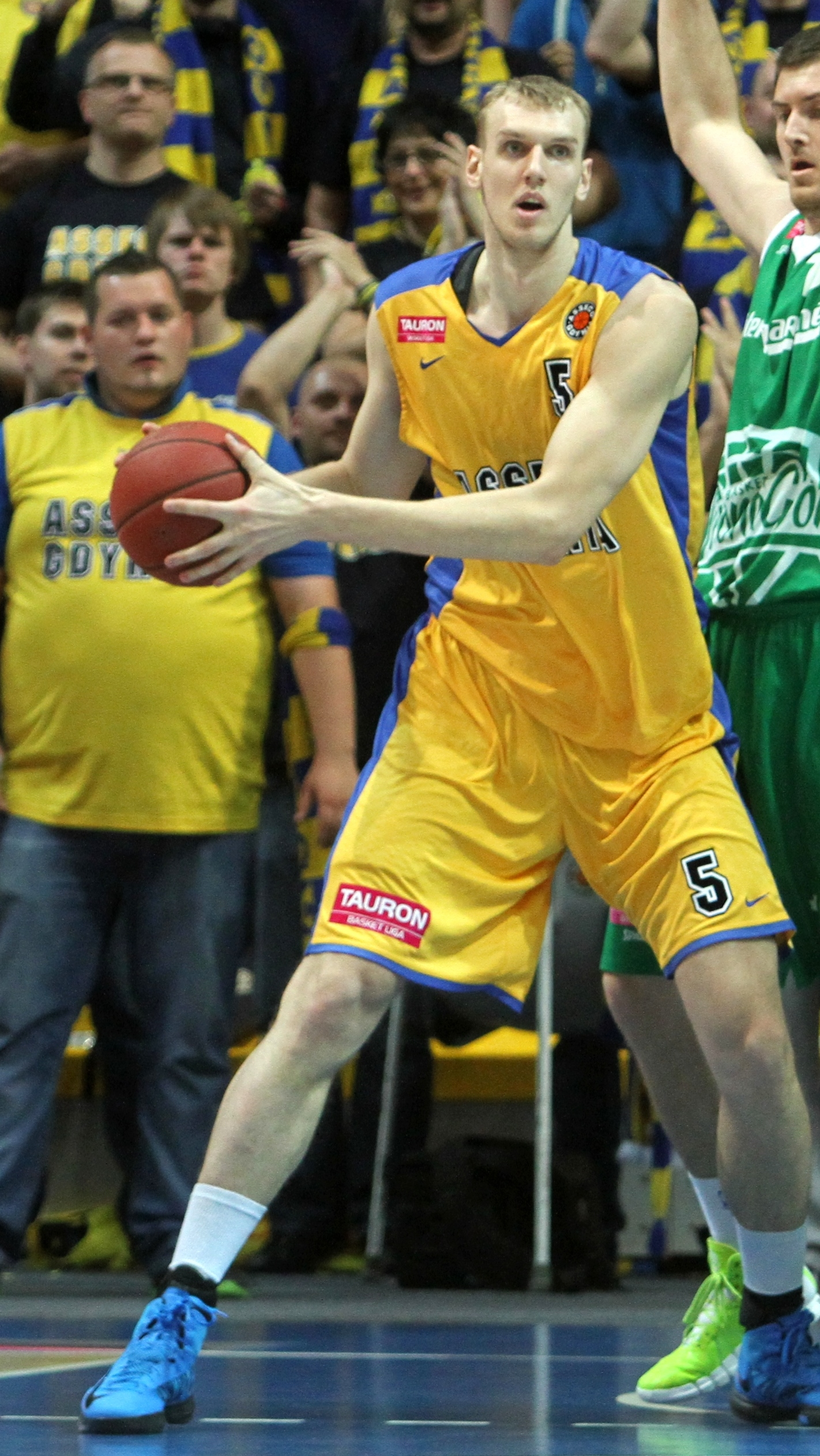 Ovidijus Galdikas Asseco Gdynia, Vladimir Dragicević, Craig Brackins Stelmet Zielona Góra